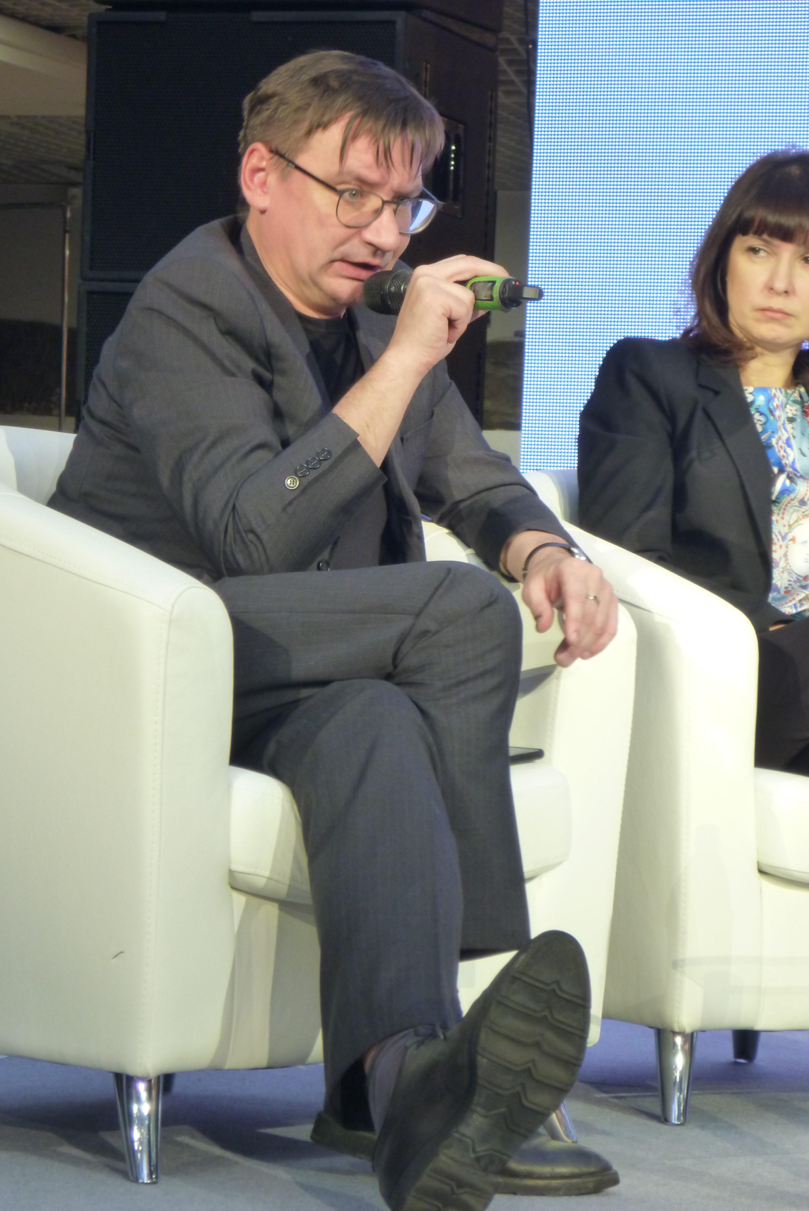 Антон Стуликов Гендиректор ОТВ 23 ноября 2018 года